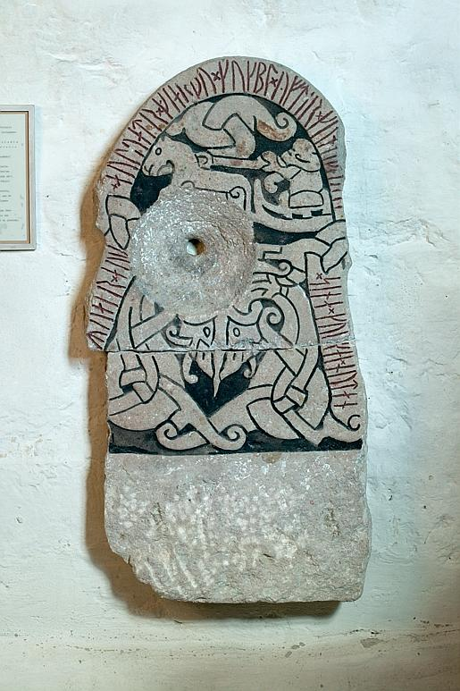 Inskriften lyder: Gairvat och Audvat gjorde kummel (=minnesmärke) efter .. Motiv: Sproge kyrka Nyckelord: Runor Kategori: Runristning/runsten, (09) Runstenar, bildstenarInskriften lyder: Gairvat och Audvat gjorde kummel (=minnesmärke) efter.